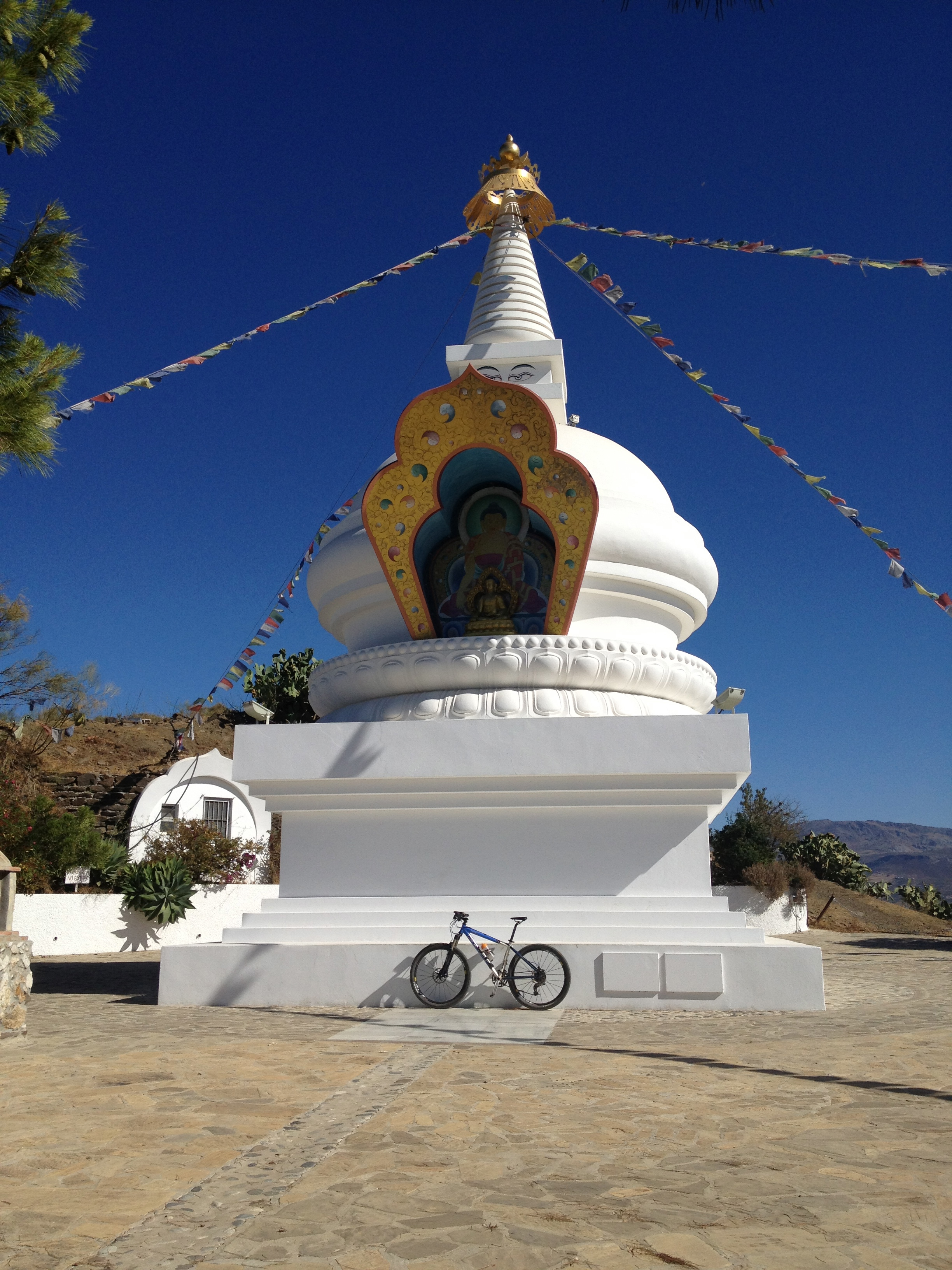 Estupa de Kalachakra, Vélez-Málaga, Spain.